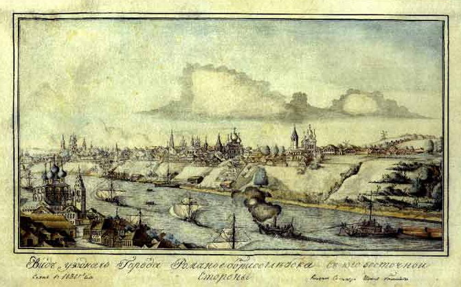 Белоногов И.М. Вид уездного города Романов-Борисоглебска с юго-восточной стороны. 1838 г. Бумага, акварель. 20,5 х 32,5. Государственная публичная историческая библиотека России